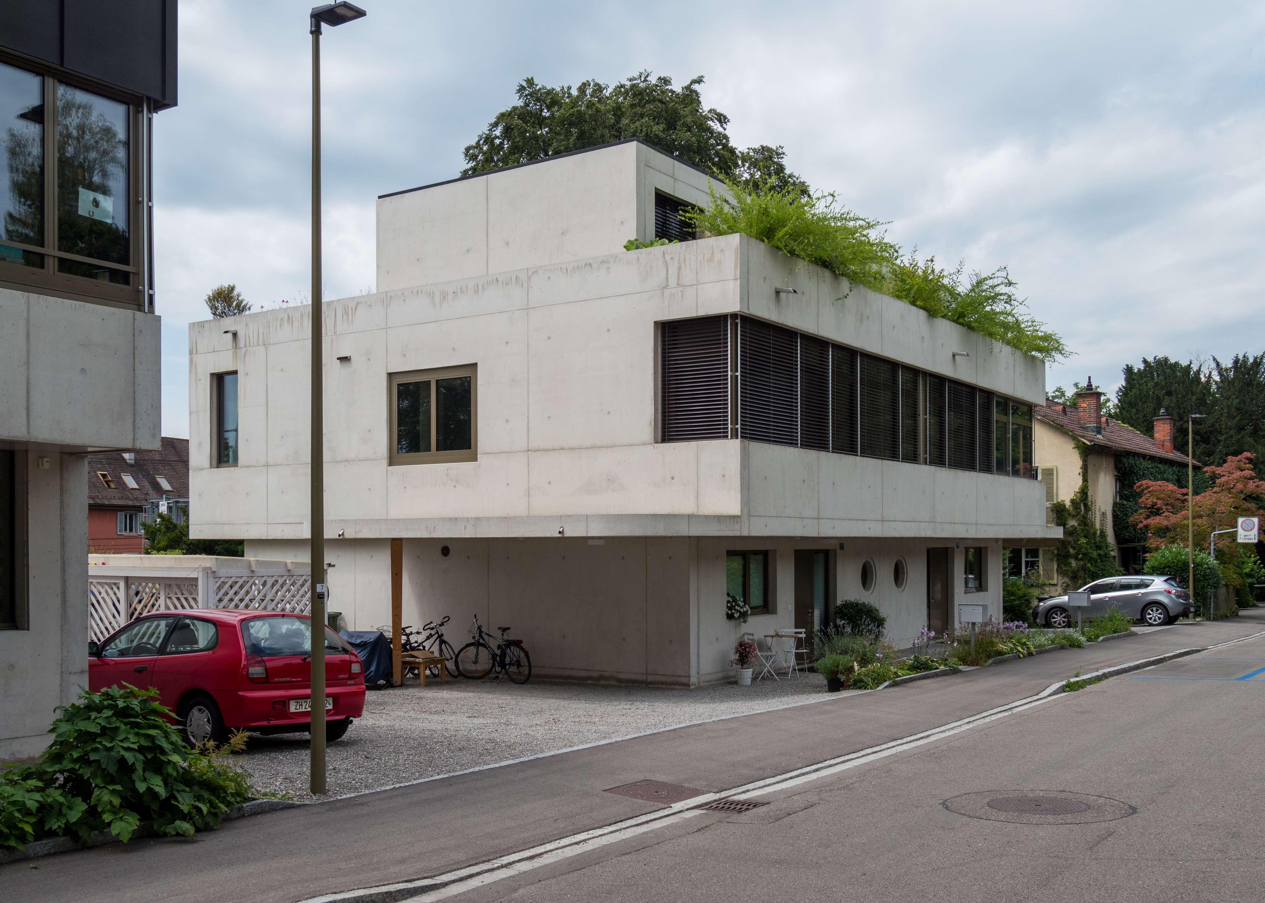 Geschmackssache: Betonhaus Leimeneggstrasse 57-59 in Winterthur. Erbaut 1932.